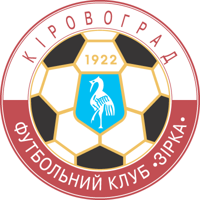 Емблема ФК Зірка Кіровоград.png: Емблема ФК «Зірка» (Кіровоград)